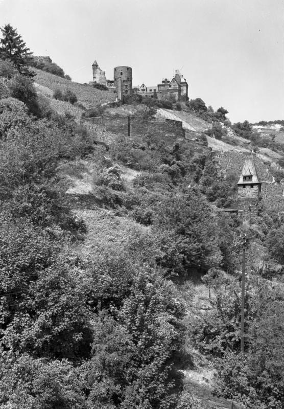 Burg Stahleck über Bacharach